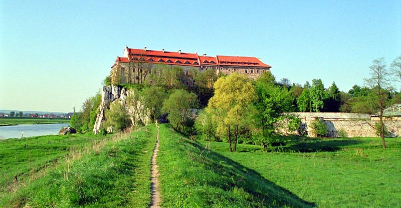 Tyniec Monastry in Krakow (Poland)